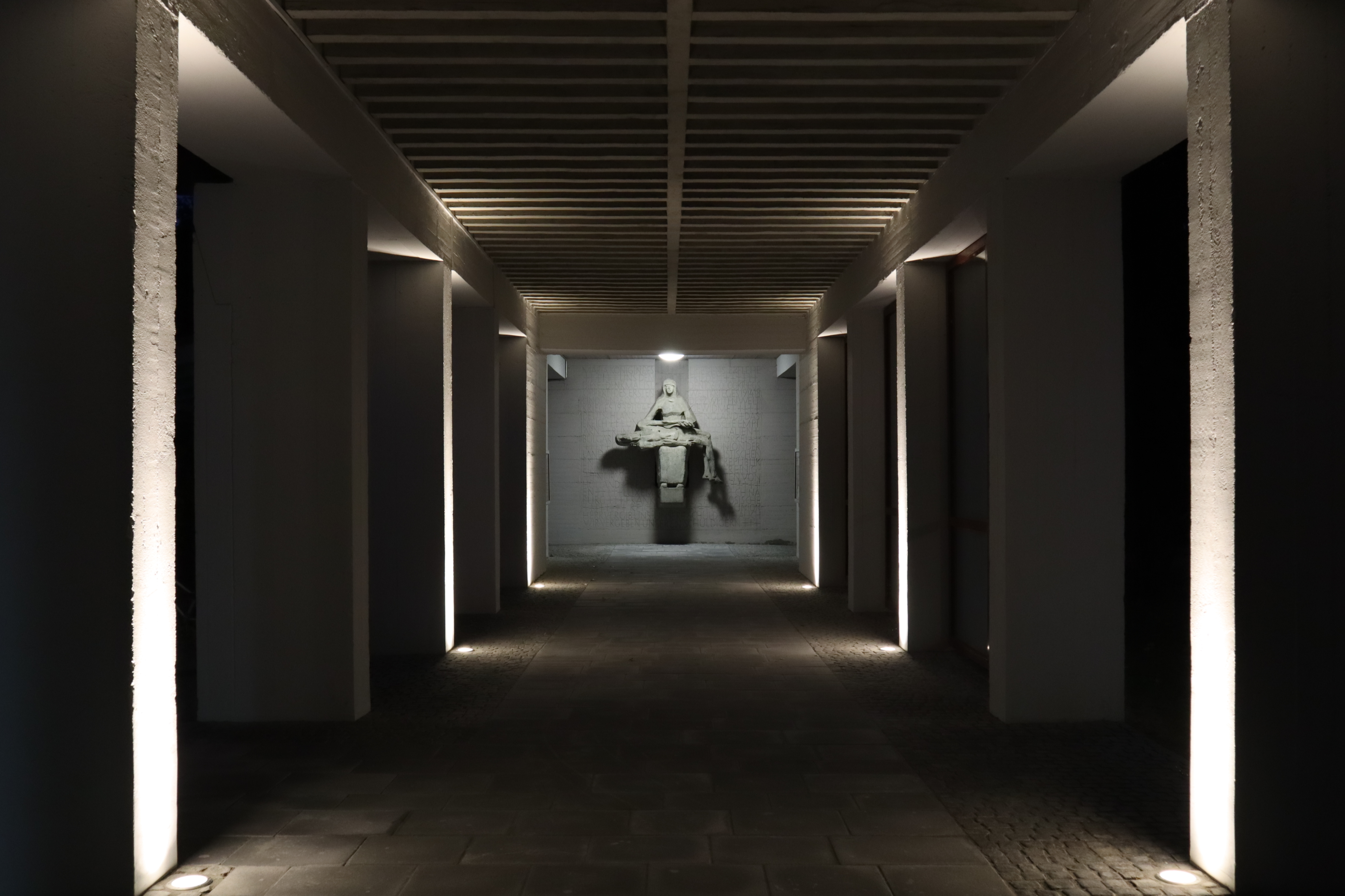 Blick vom Eingang der Kirche aus auf das Kriegerdenkmal im Erdgeschoss des Turmes der Kirche bei Dämmerung.